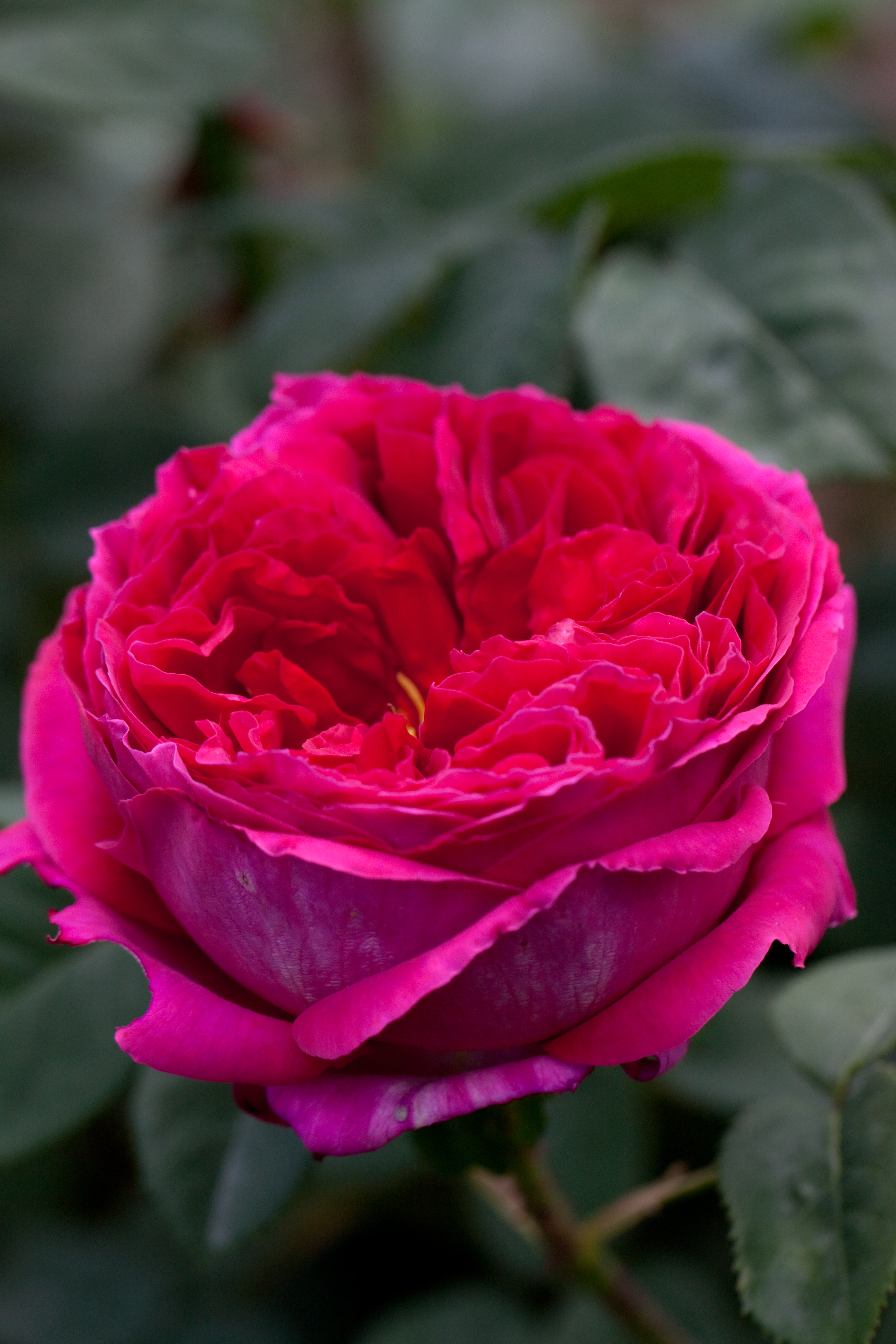 The Prince. ザ・プリンス。